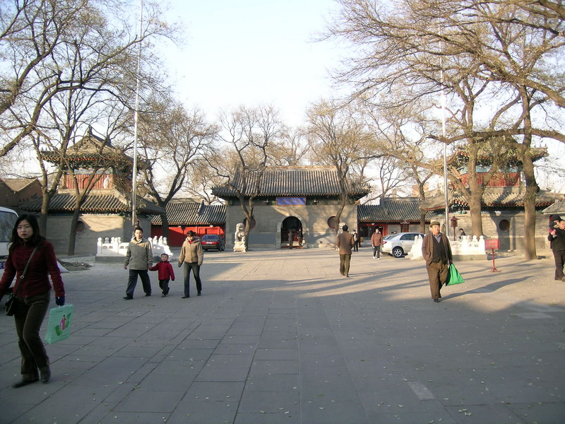 广济寺大院 2004年12月smartneddy摄于zh:广济寺，授权使用